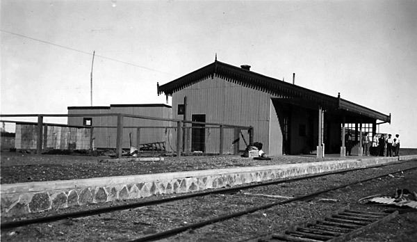 Estación Jaramillo en los trenita